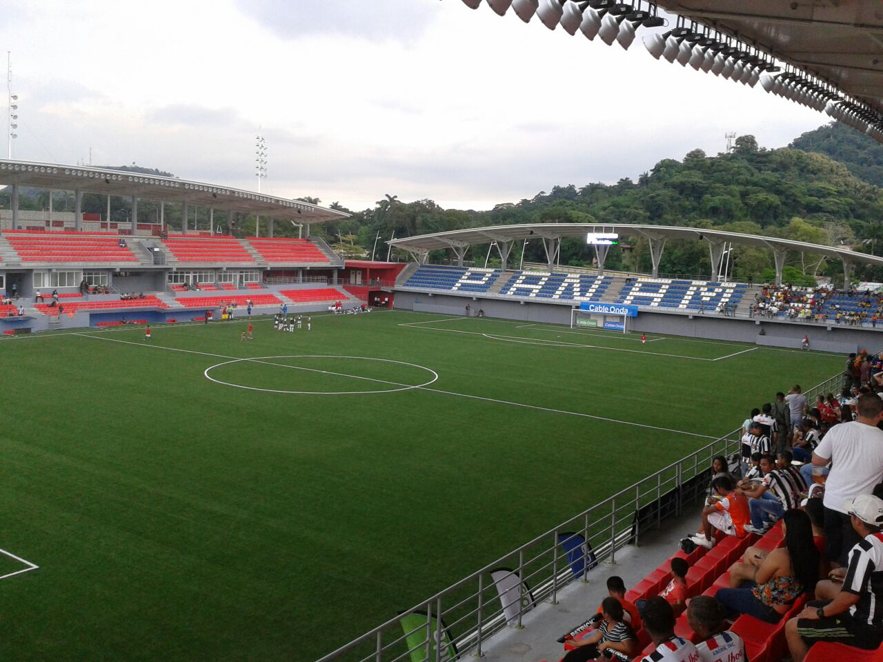 Estadio Maracaná por dentro, ciudad de Panamá.